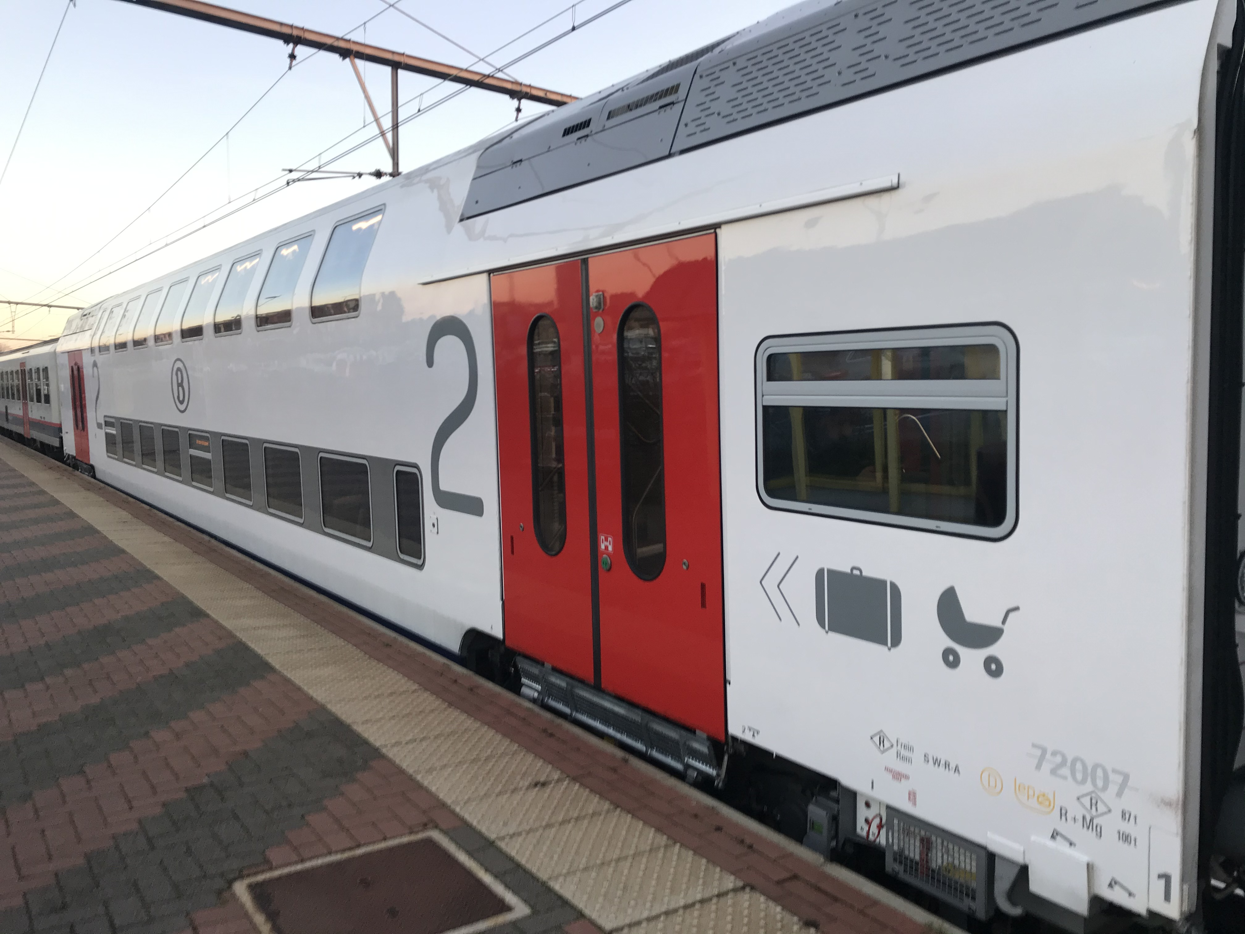 Een M7-rijtuig